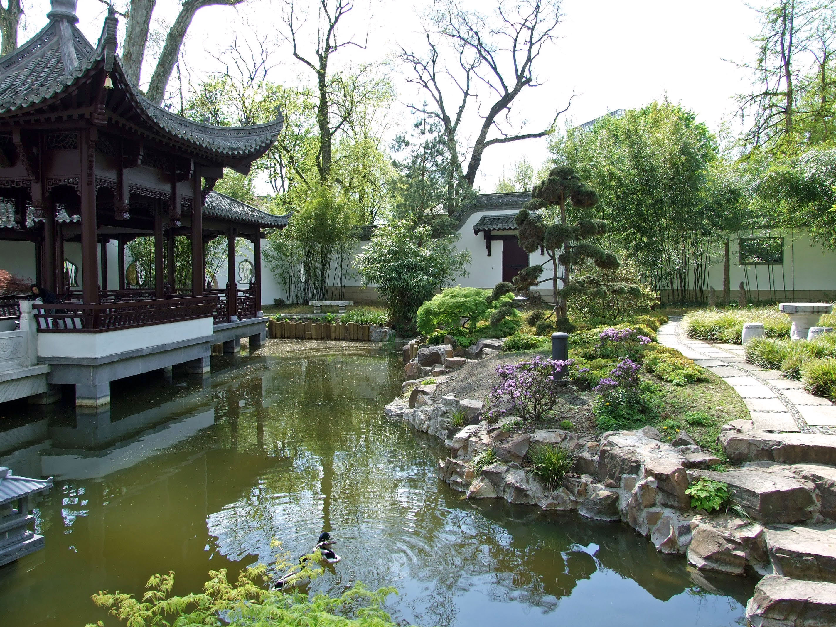 Garten des Himmlischen Friedens im Bethmannpark in Ffm (=Garden of Celestial Peace) Chinese Garden at Frankfurt (Germany)